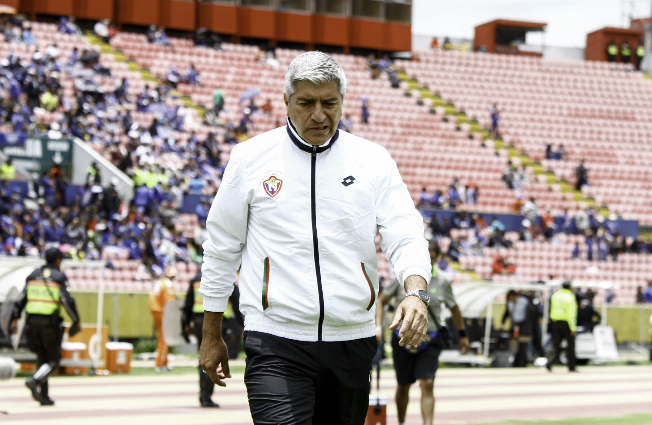 Quito, 15 mar (ANDES).- Por la séptima fecha del Campeonato Nacional de Fútbol se enfrentaron los equipo de El Nacional (rojo) y Emelec (azul) en el estadio Olímpico Atahualpa. En la gráfica Octavio Zambrano DT de el Nacional. Foto: Micaela Ayala V./ANDES